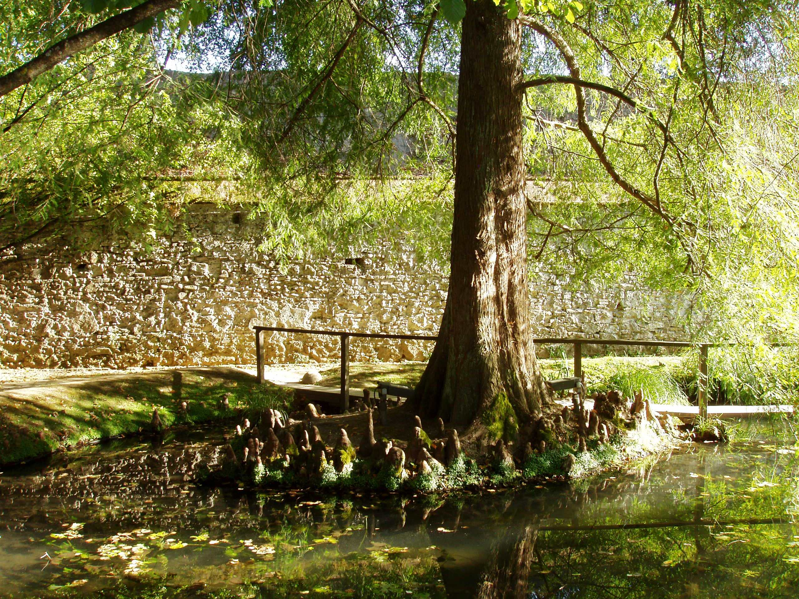 Orto Botanico Comunale di Lucca - pond and city wall. Lucca, Italy.